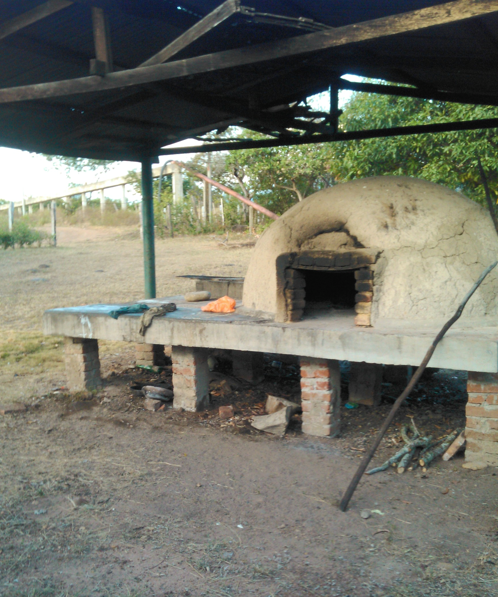 Horno típico, hecho de barro, ladrillo y gravilla su uso es fundamental para hacer "El asado huilense, bizcochos de achira, lechona" platos típicos de la región, ubicado cerca de la ciudad de Neiva, aquí muchas personas cercanas vienen a disfrutar de un buen y sabroso plato típico con su sabor característico hecho por este horno. Esta fotografía fue tomada en el municipio colombiano con código 41001.